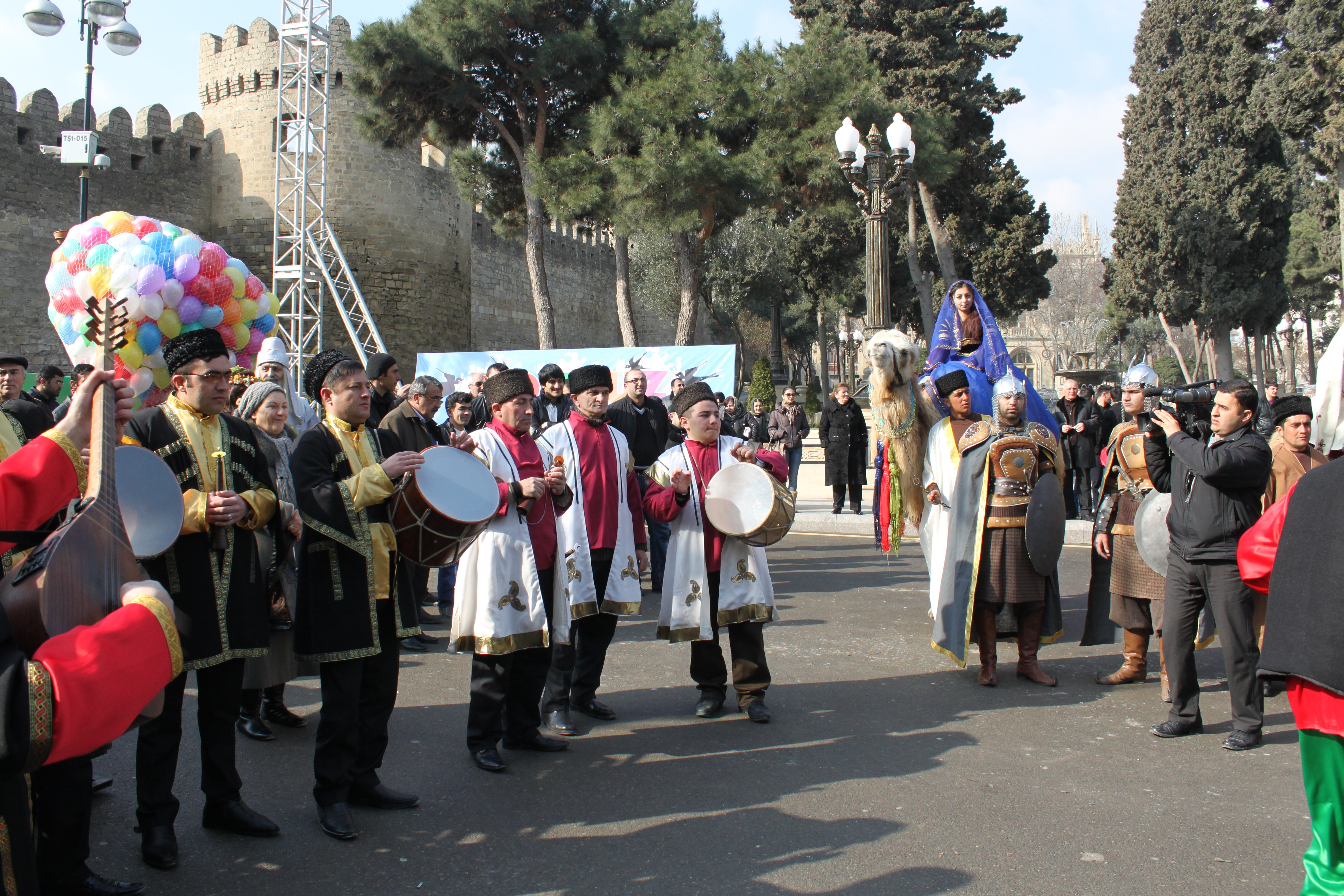 Празднование Новруза в Баку (У ворот Старого города)